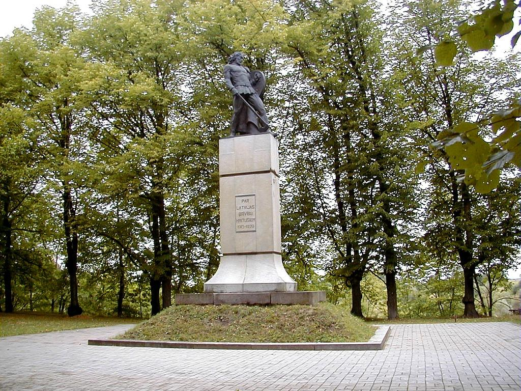 Bauska, brīvības cīņu piemineklis. 1999-08-07